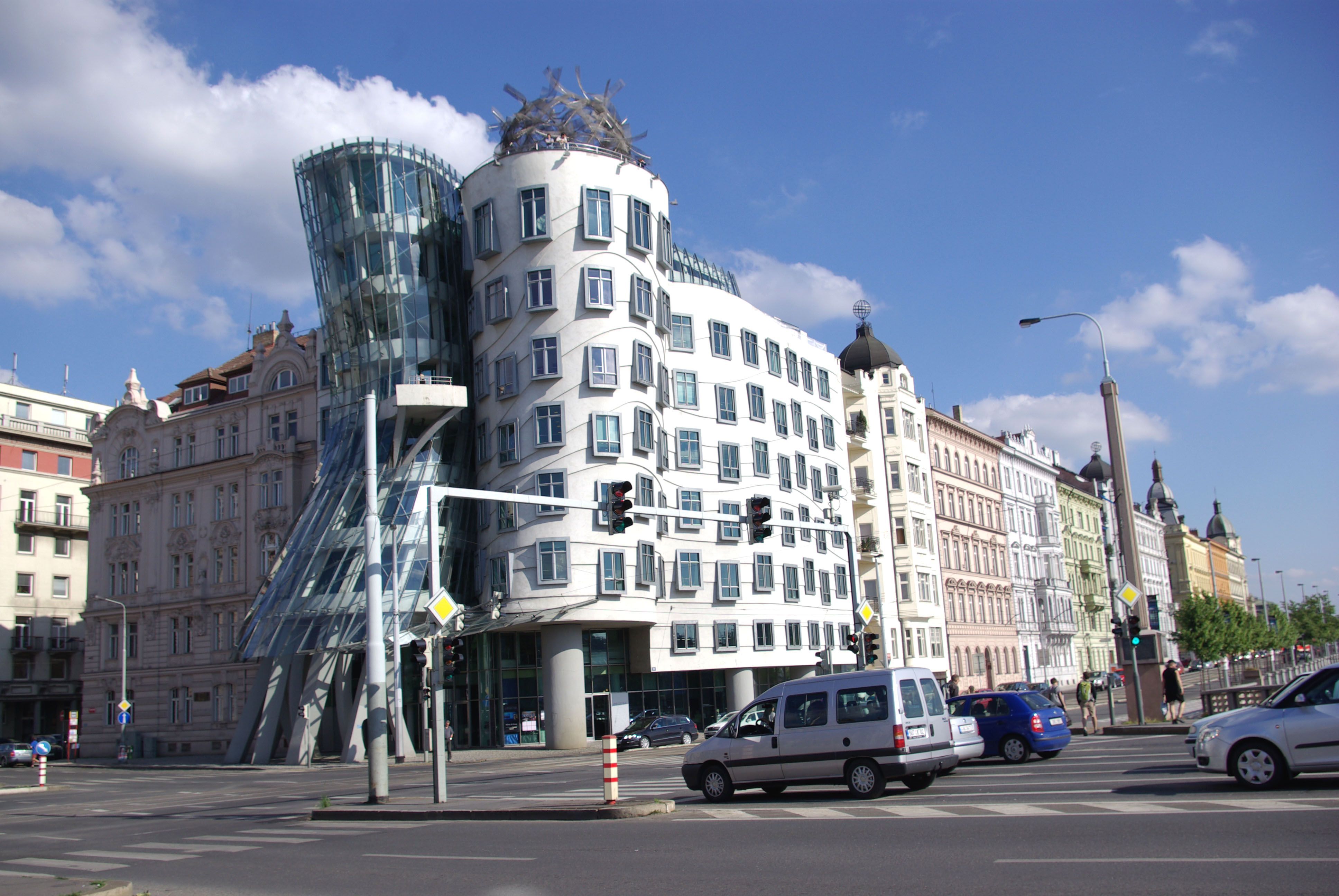 La maison qui danse, Prague, République Tchèque